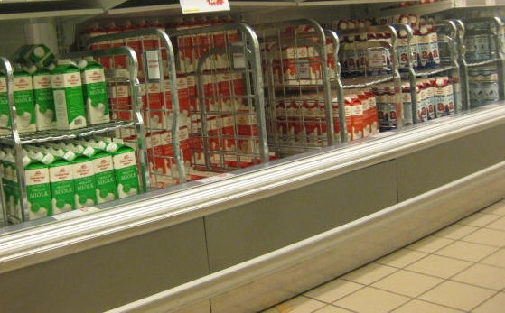 Falköpings Mejeri:s olika utbud i affären Willy:s.